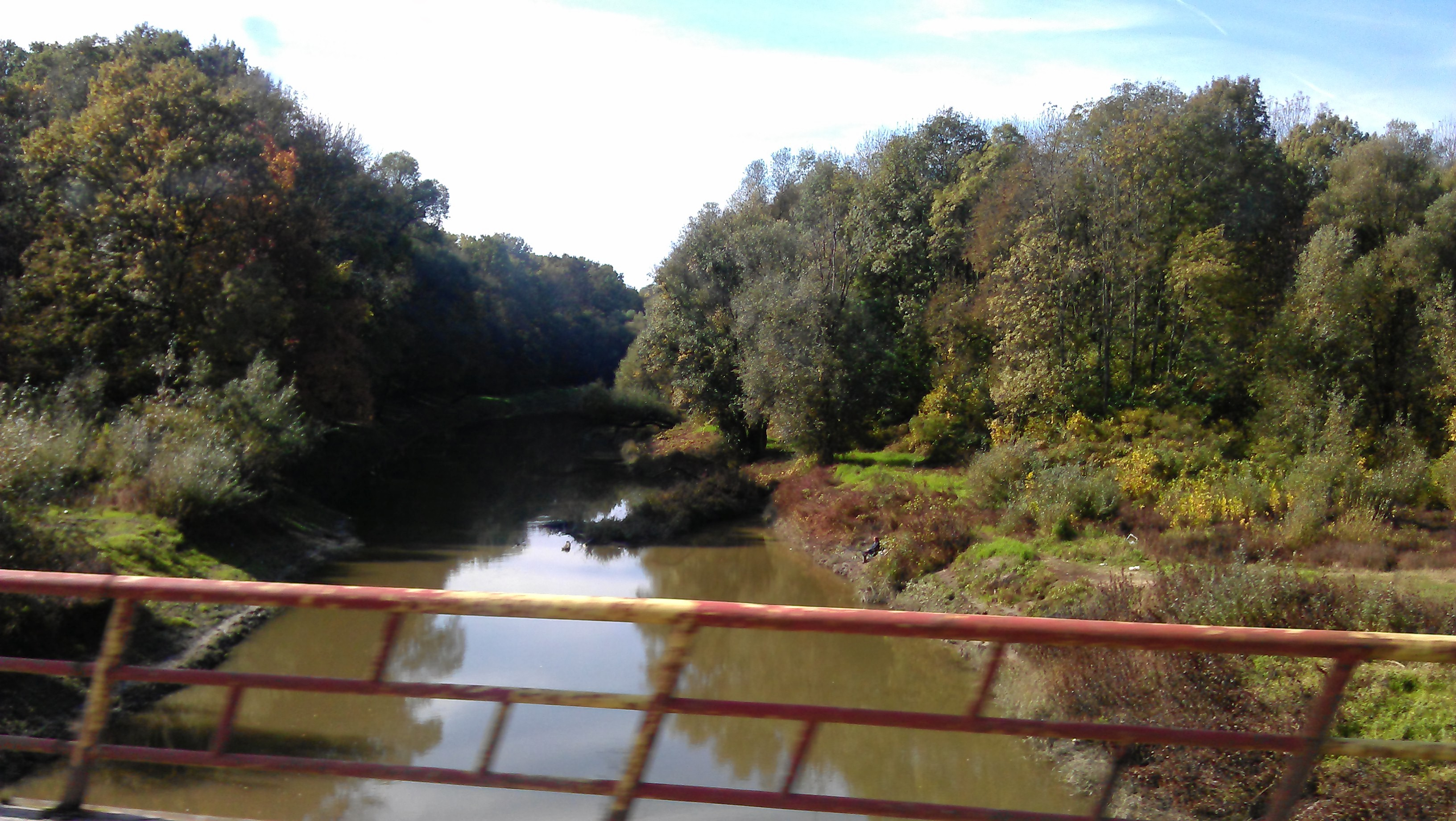 Lonja